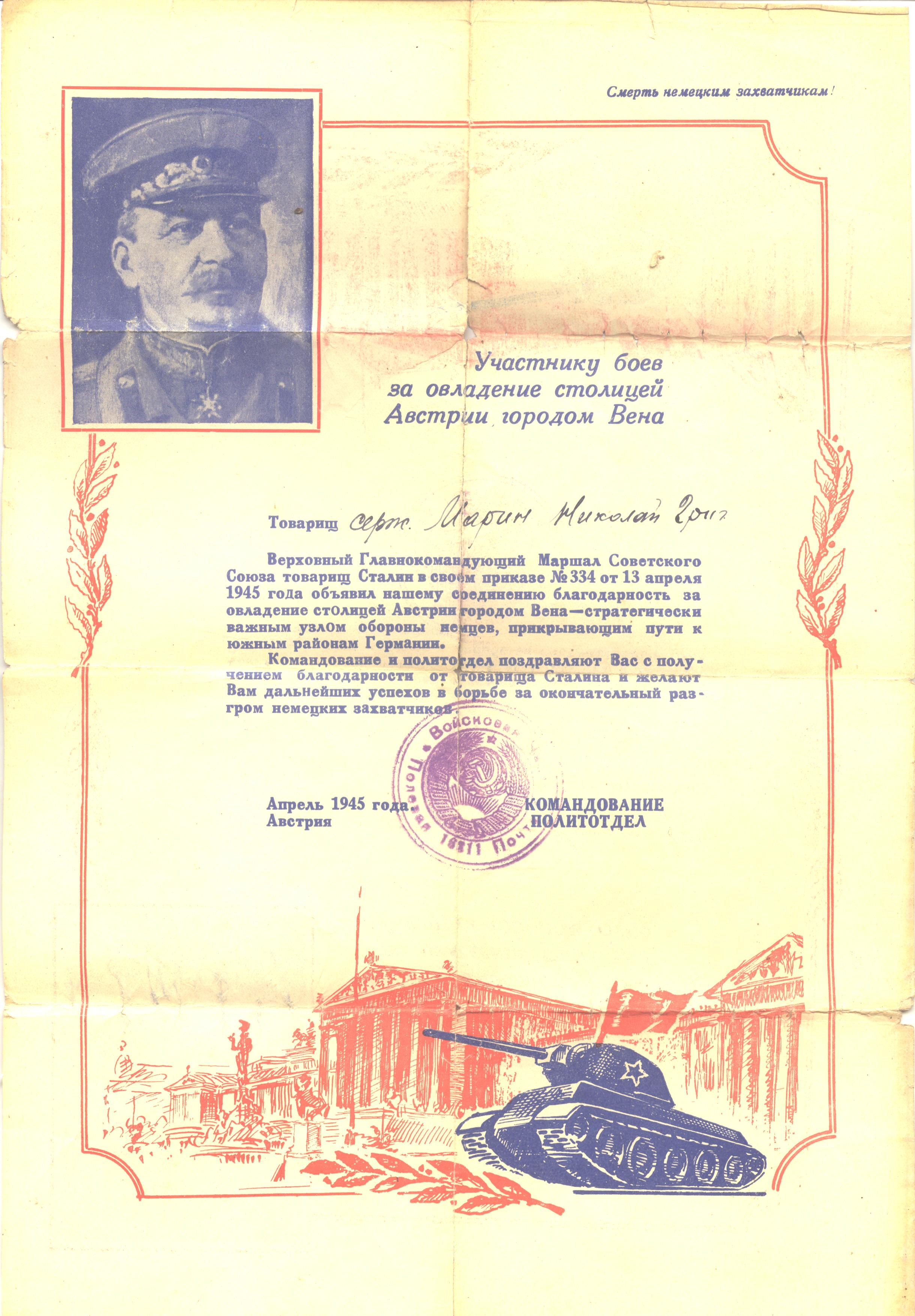 Благодарность Сталина за взятие Вены